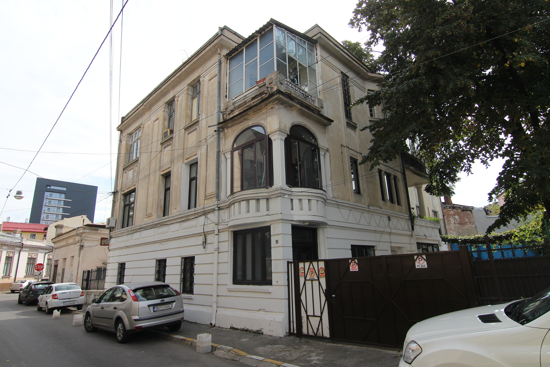 Casă pe Str Robescu